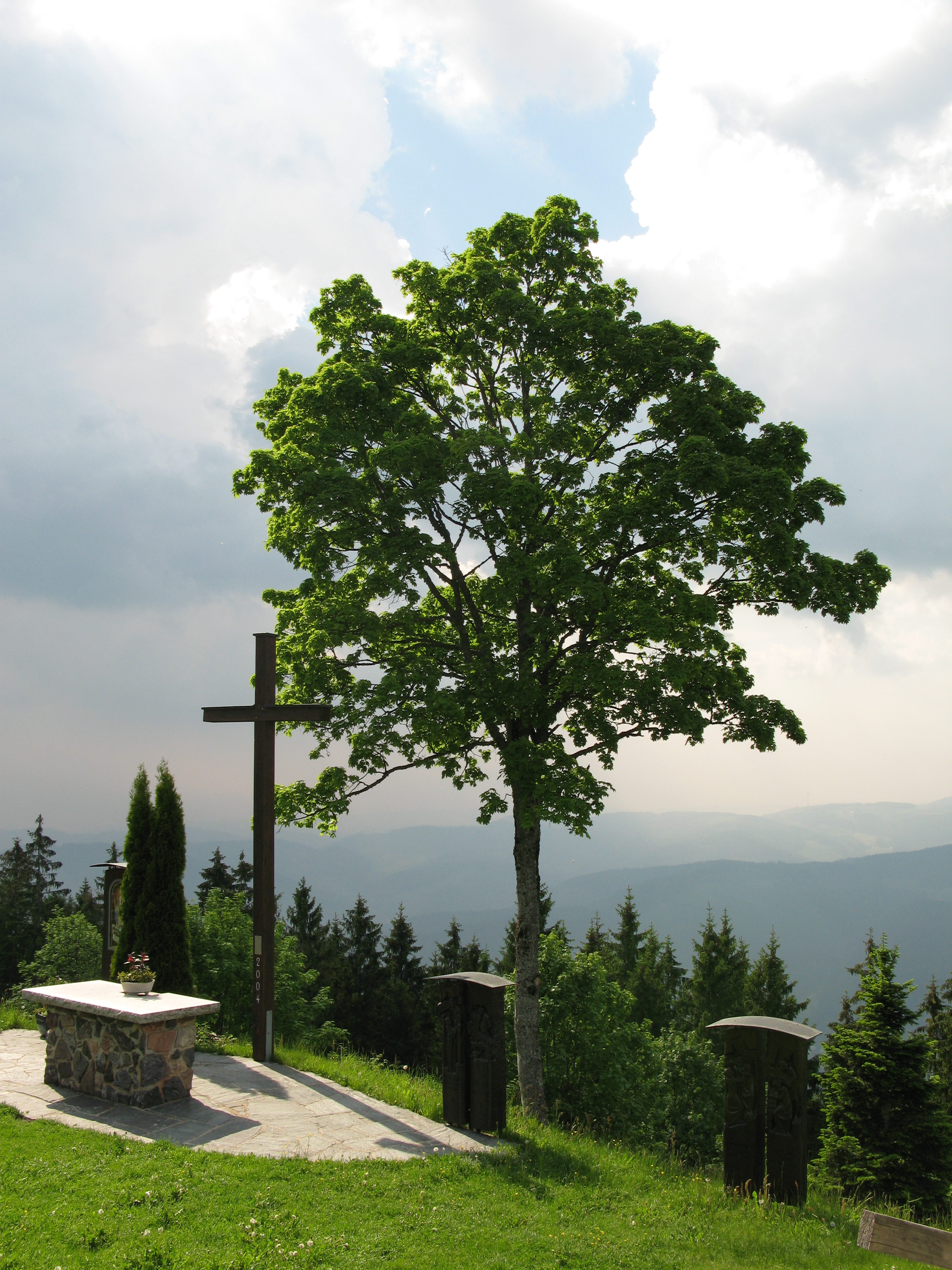 Altar der Wallfahrtskapelle auf dem Hörnleberg oberhalb des Simonswäldertals im Schwarzwald am Zweitälersteig.